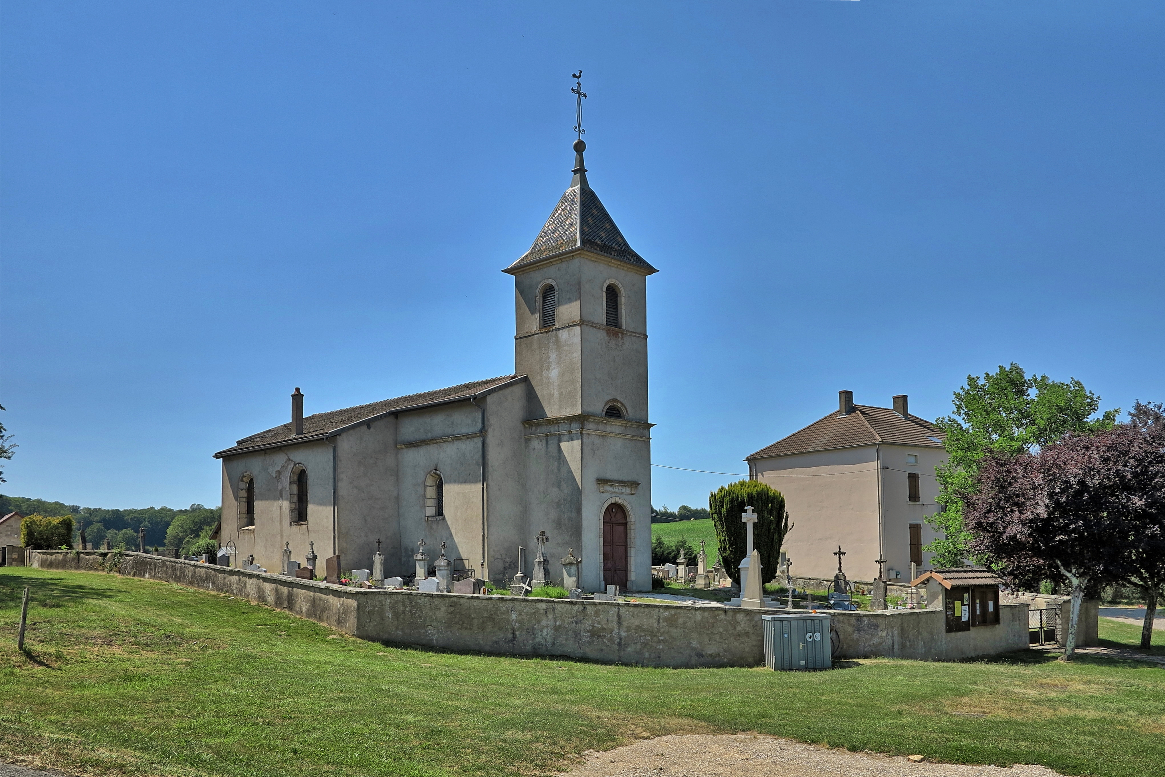 L'église de Saint-Gand